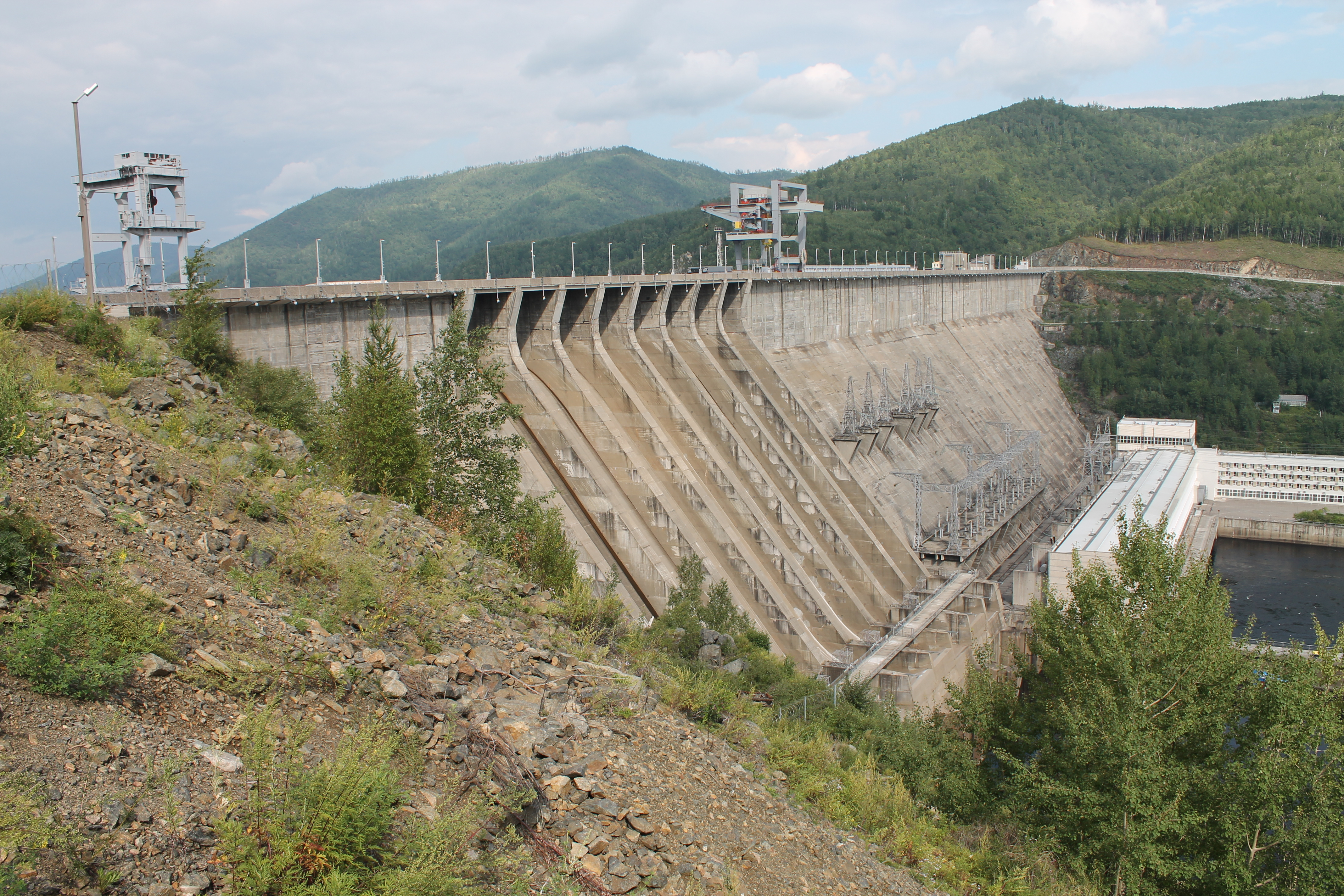 Зейская ГЭС